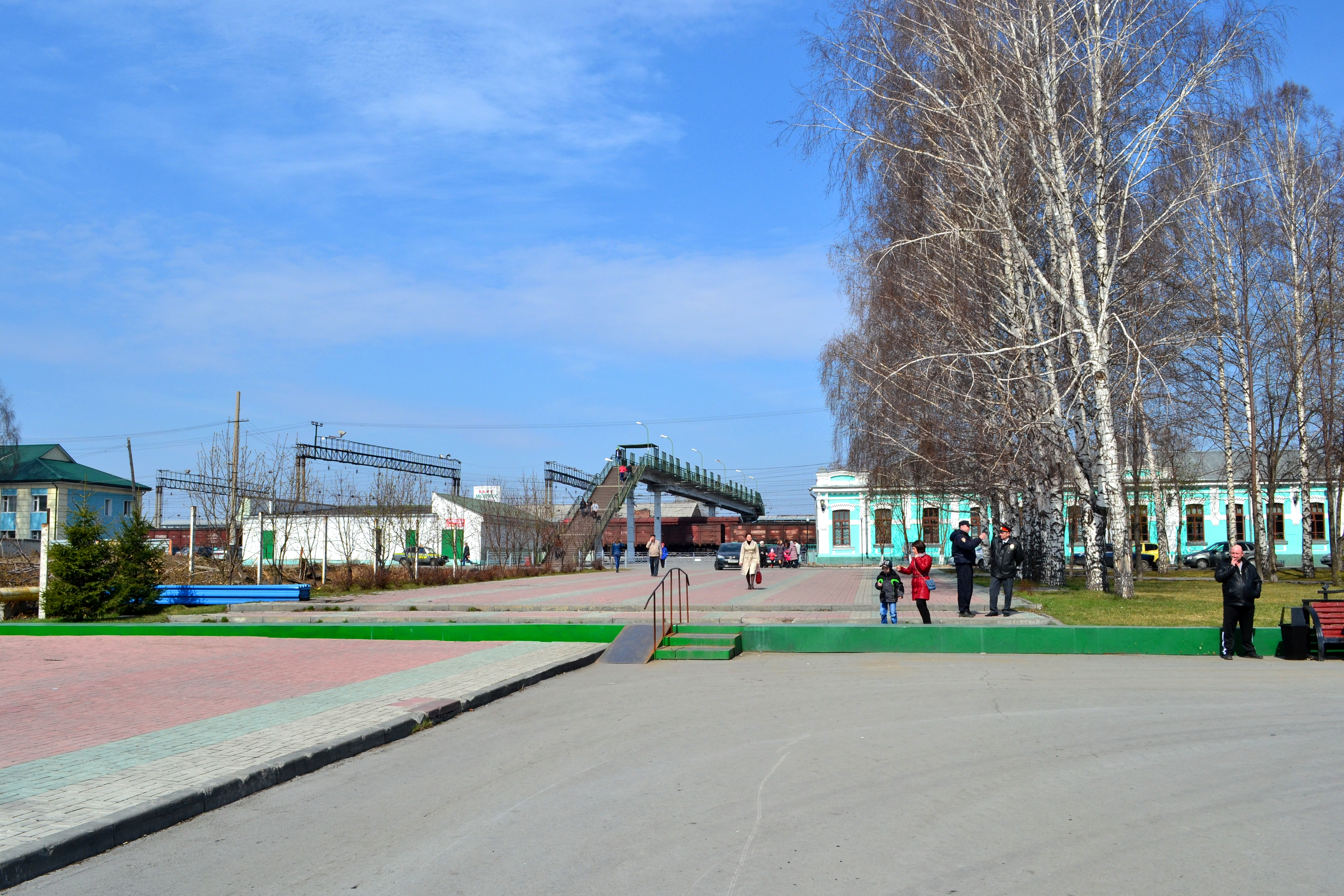 (Кемеровская область, Топки, привокзальная площадь)